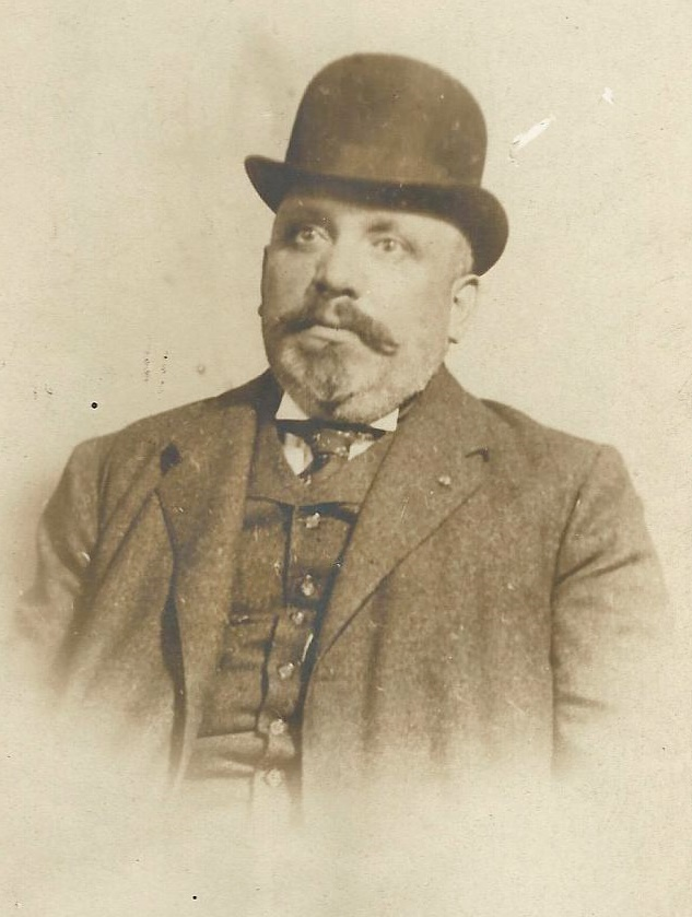 Farkasházy Jenő porcelángyáros, keramikus, művészettörténeti író